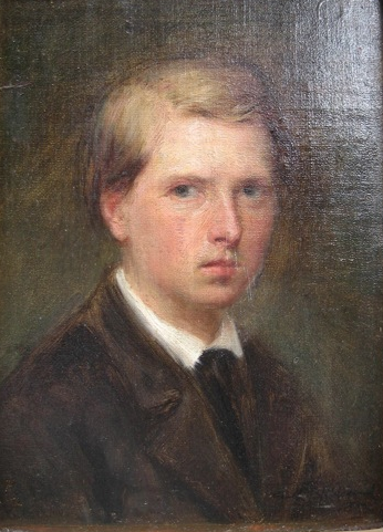 Frühes Selbstbildnis des Malers